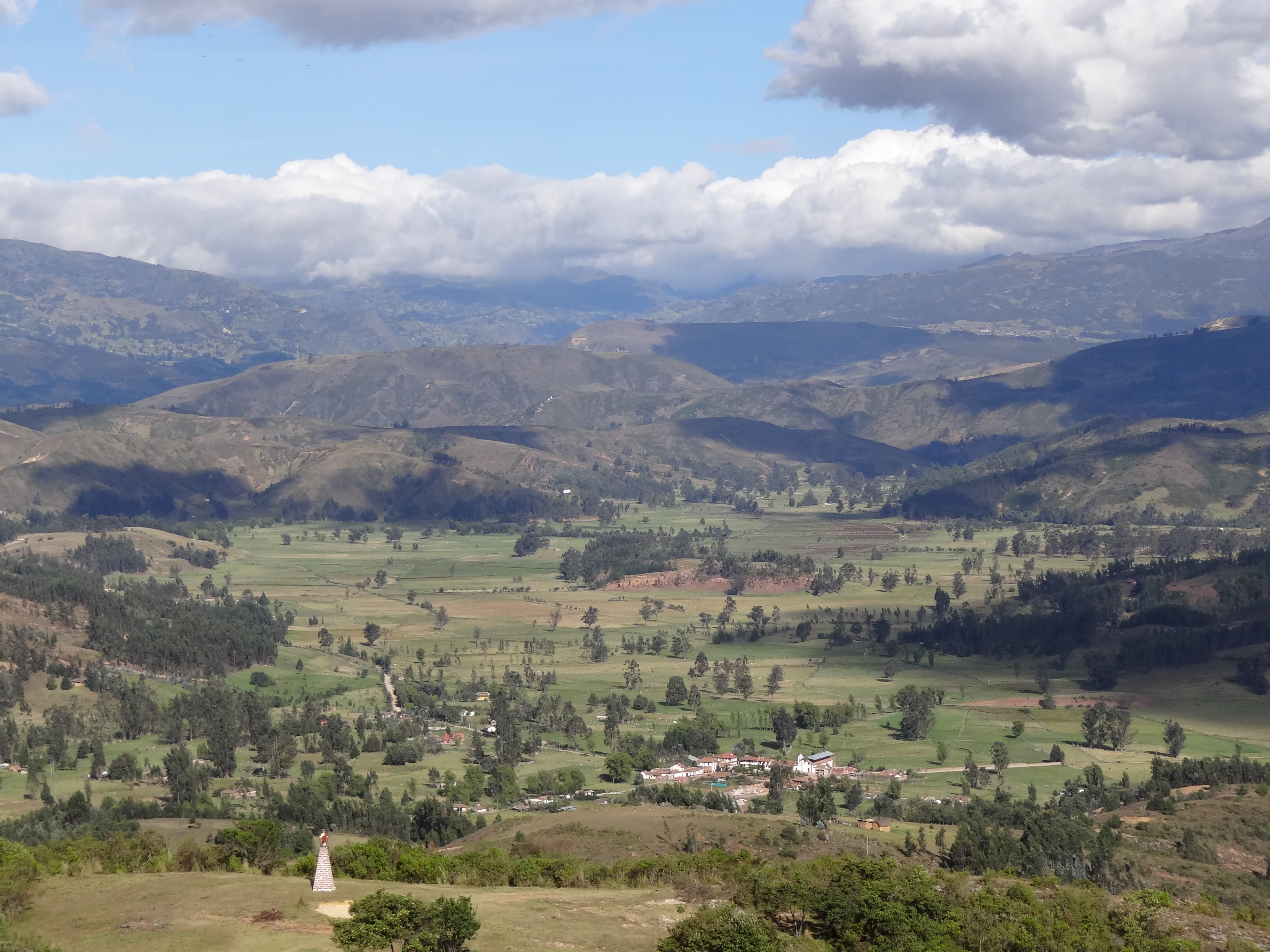 Panorámica de la región rural del municipio de Floresta, departamento de Boyacá, Colombia